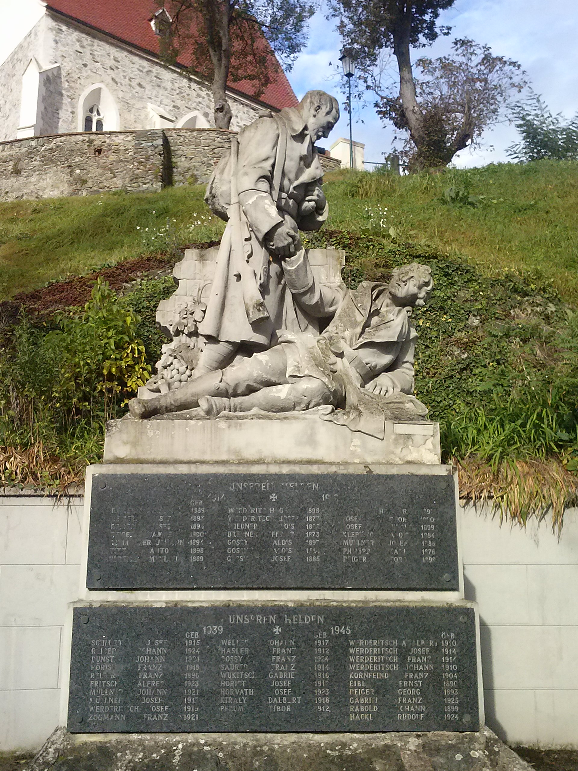 Hannersdorf Kriegerdenkmal